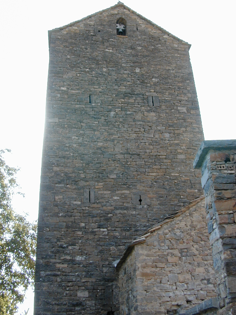 Fachada de torre de planta cuadrada vista desde el pie. Casa Buil de San Vicente de Labuerda, Comarca de Sobrarbe